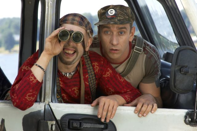 Фото со съемок кинокомедии «Святое дело». Справа Шатохин, Александр Анатольевич.